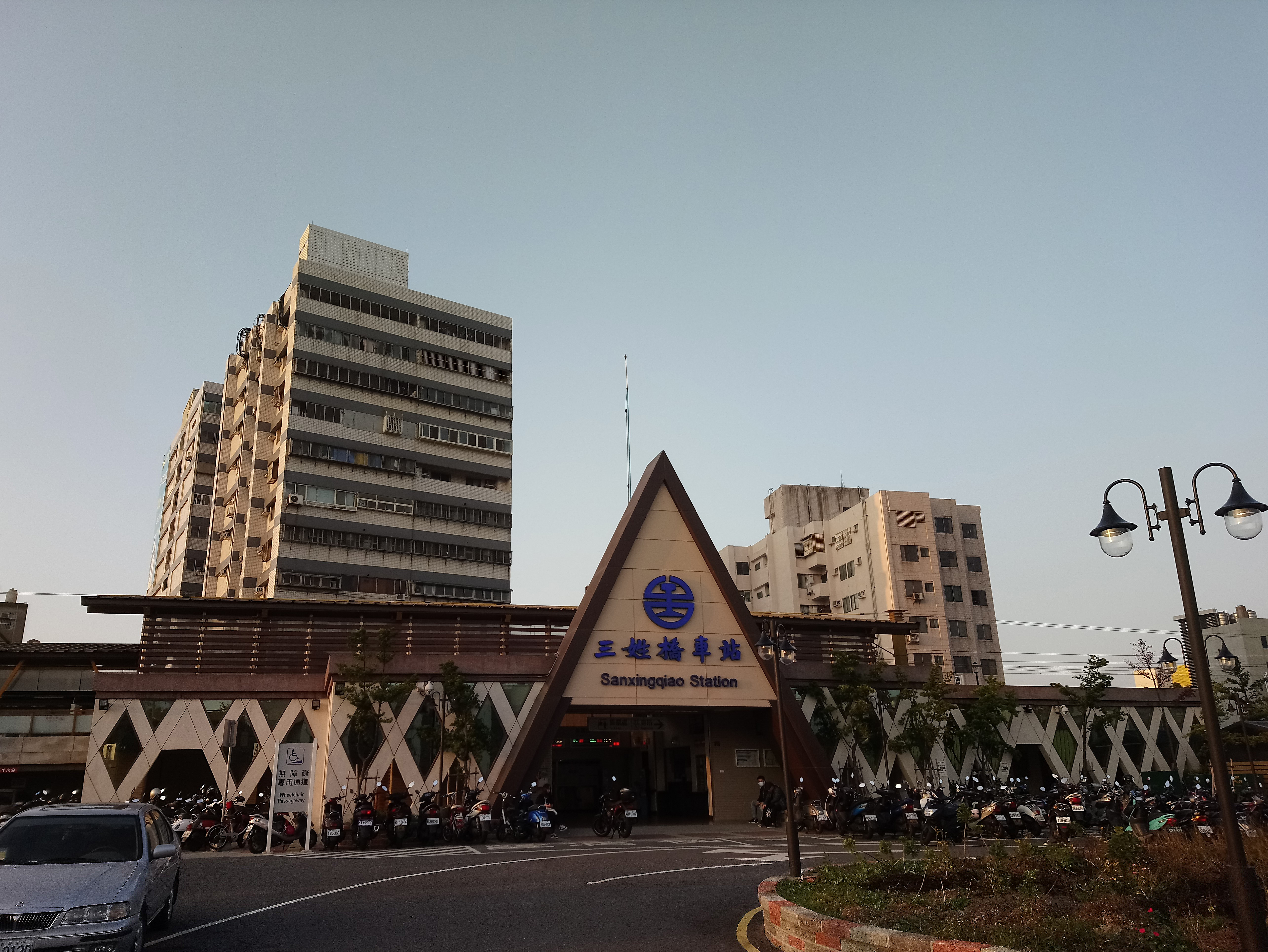 臺鐵三姓橋車站,台灣省新竹市香山區香山聯里香山里